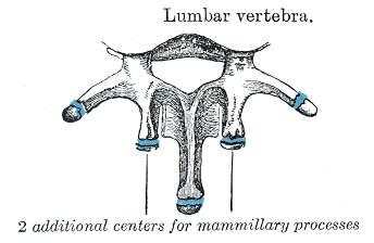 Lumbar vertebra.